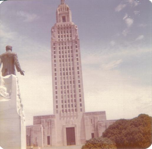 Louisiana State Capitol, Baton Rouge, 1972.